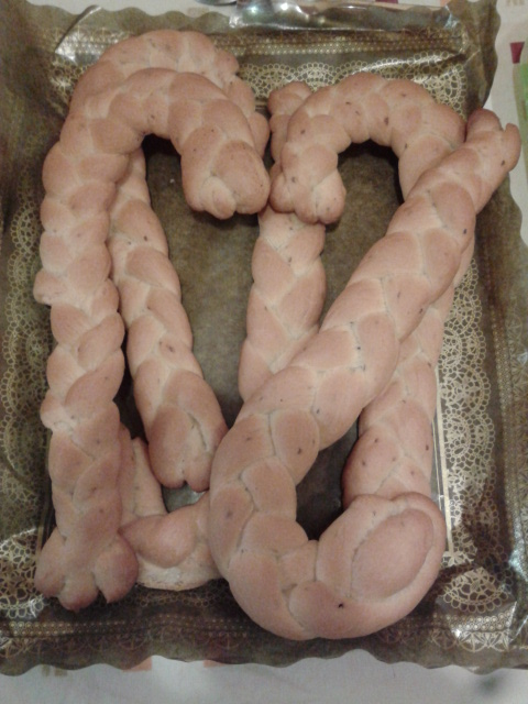 Típics gaiatos de Sant Blai, Torrent 2015